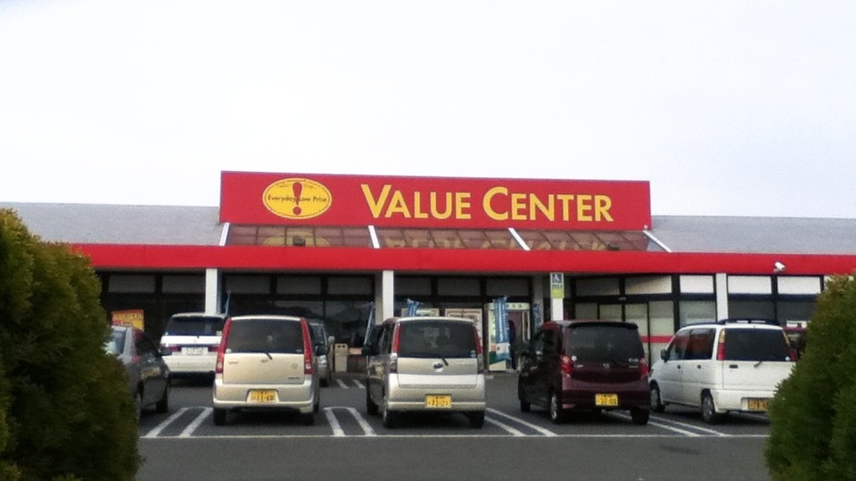 マックスバリュ中部の商業ブランド「バリューセンター」の写真です。